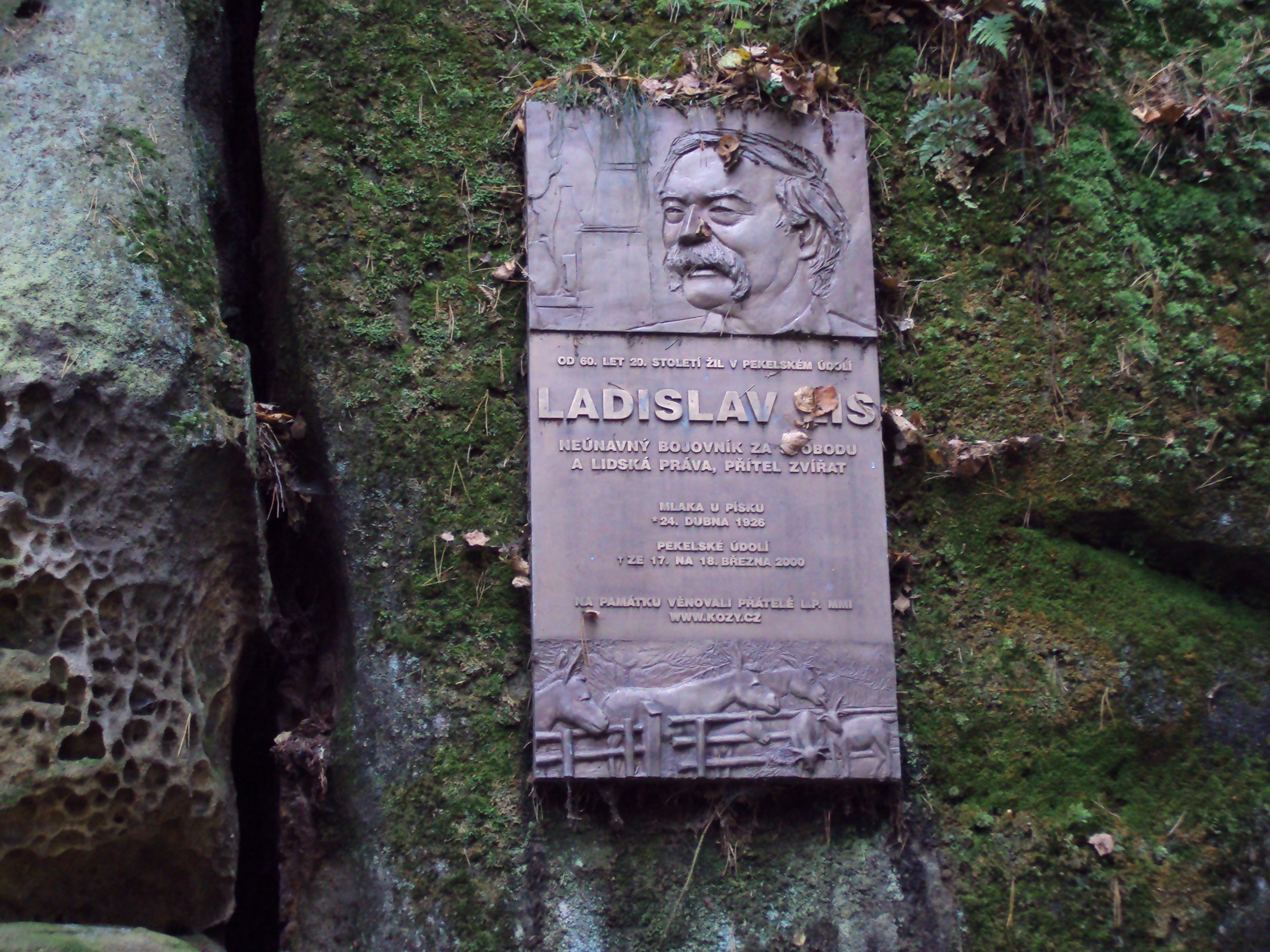 Pamětní deska disidenta uprostřed PP Peklo